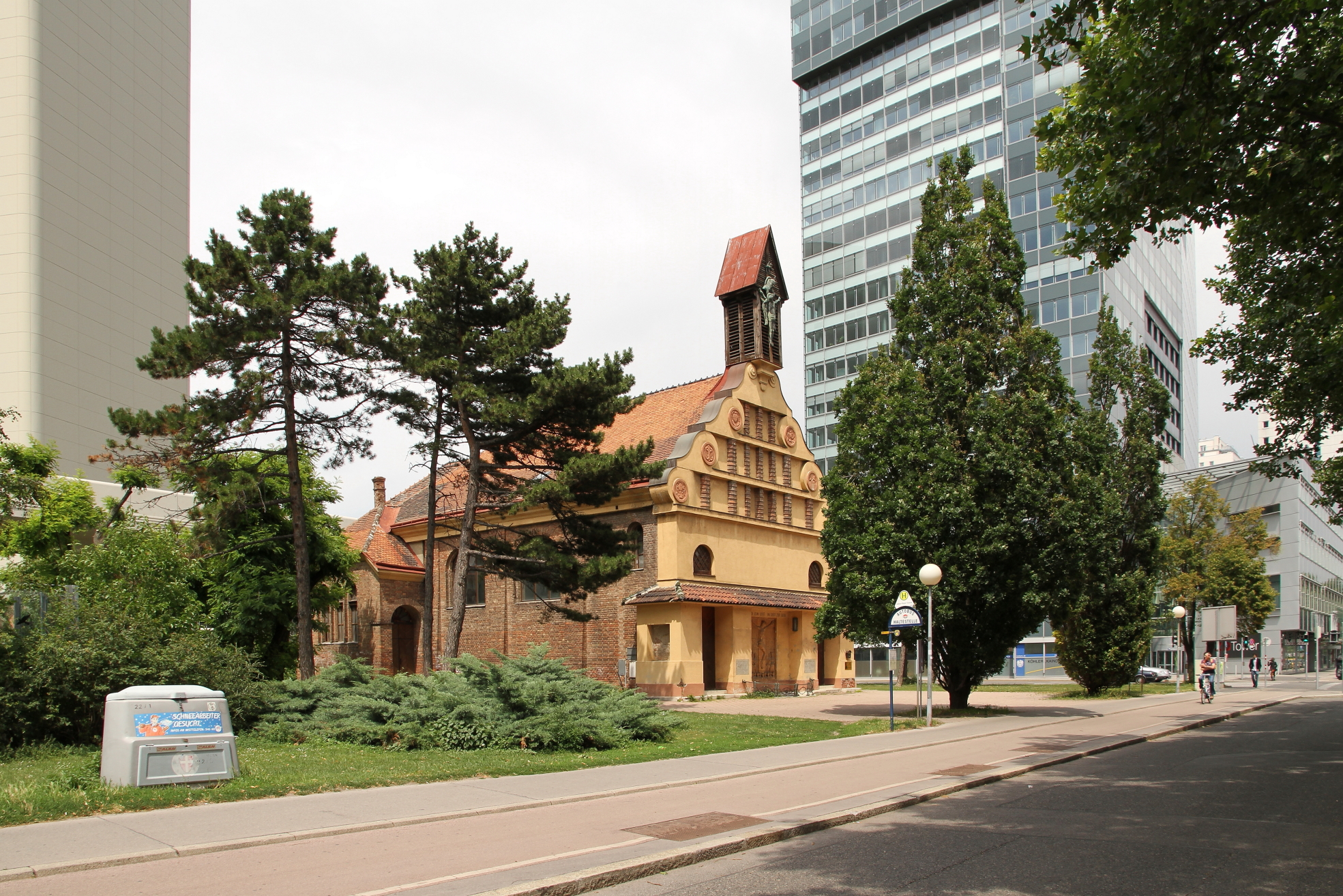 Die Koptische Markuskirche im Wiener Bezirk Donaustadt (22. Bezirk, Wagramerstraße 17 A).